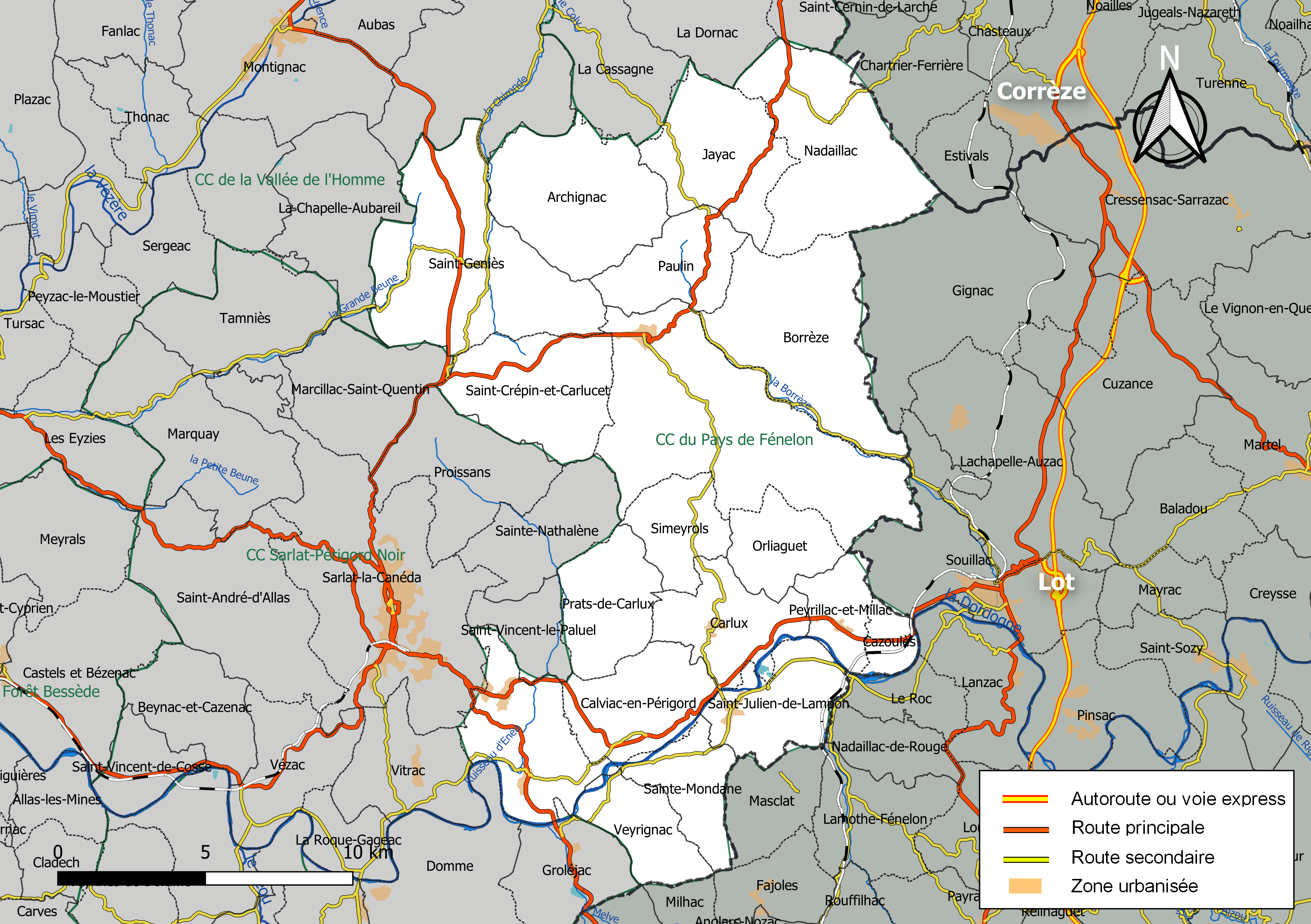 Carte géographique de la Communauté de communes du Pays de Fénelon (nouvelle), département de la Dordogne, France. Composition au 1er janvier 2019.